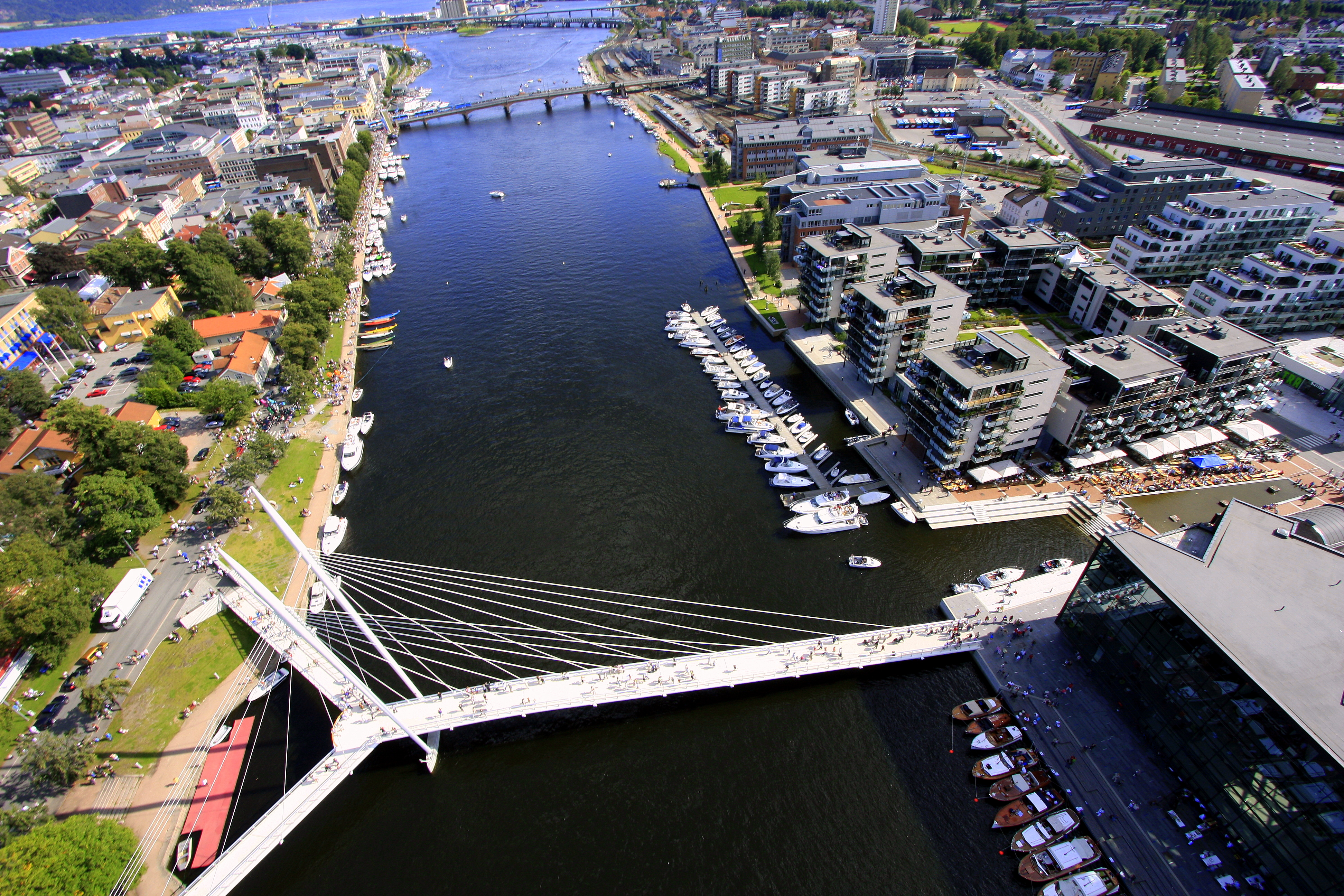 Ypsilon ble bygget i 2008 og binder Strømsøsiden og Bragernessiden av Drammen sammen